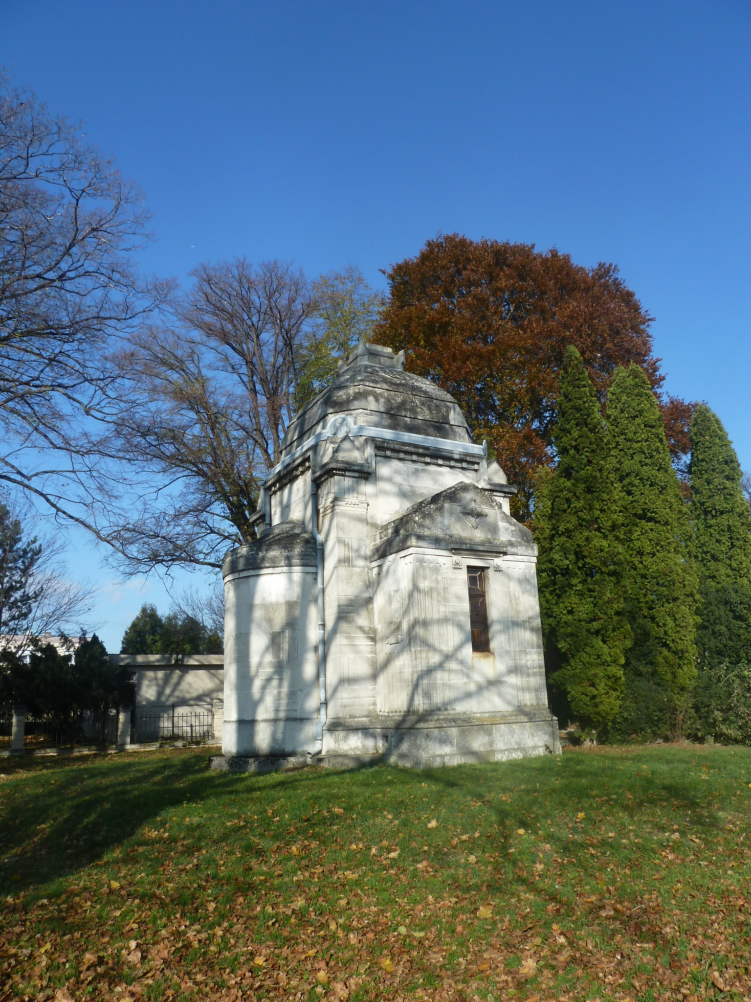 Kaplnka Panny Márie Pomocnice a zároveň hrobka rodu Stummer v Horných Obdokovciach.